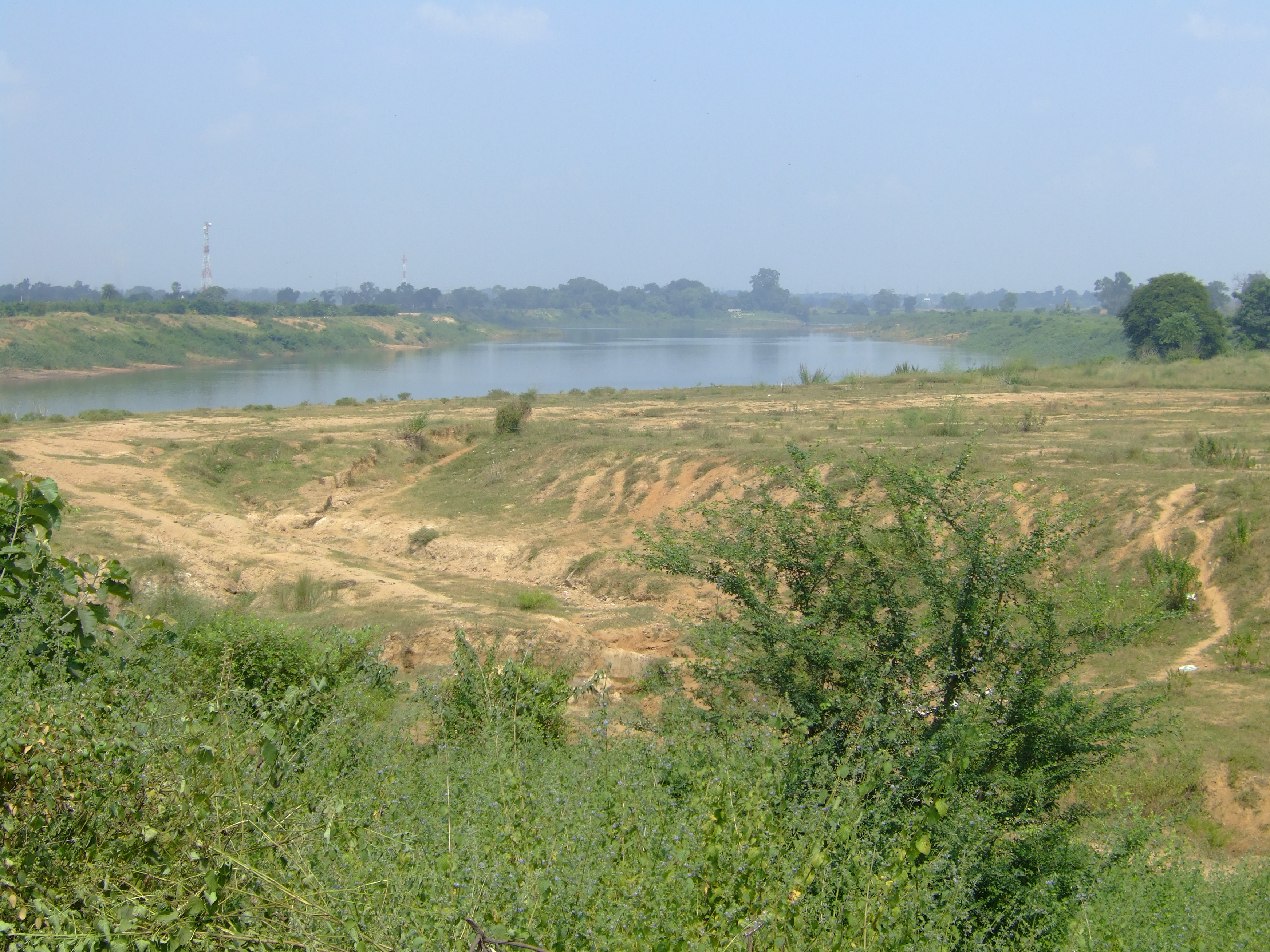 il fiume Ib nei pressi di Jharsuguda (Orissa)